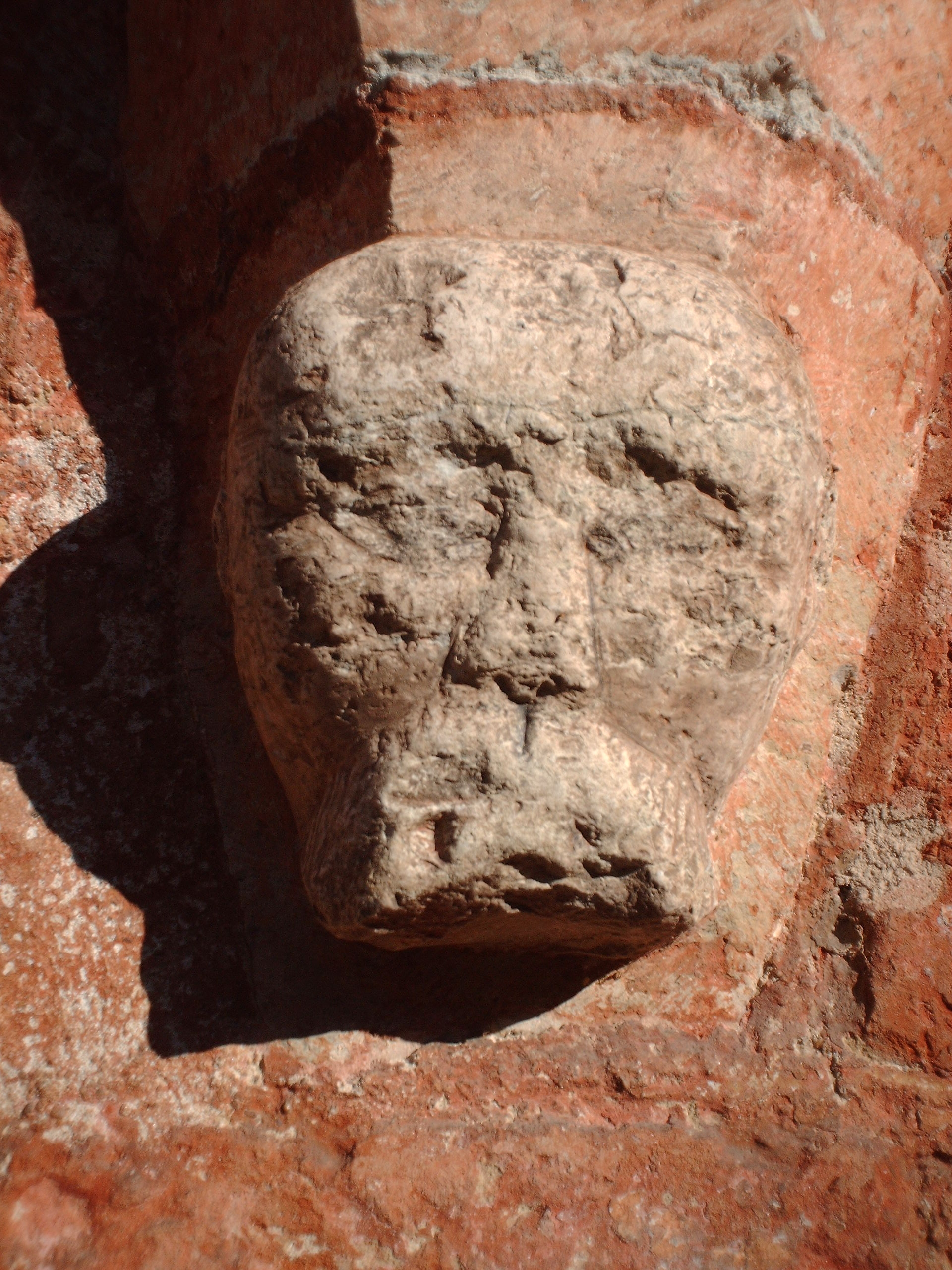 Mårten Nilsson Skinnare? Vadstena, Sweden